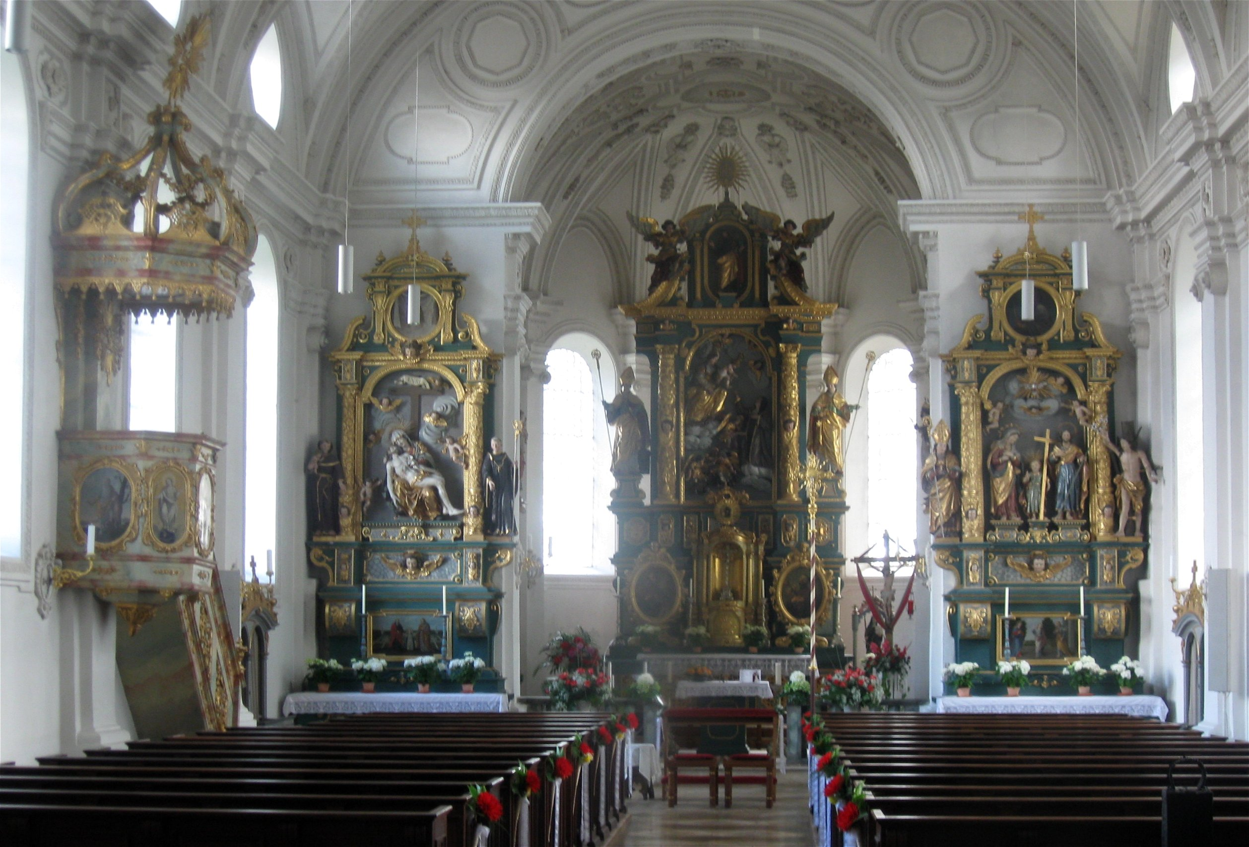 Katholische Wallfahrtskirche St. Ottilia, Möschenfeld, frühbarocker Saalbau mit Blendarkaden, stark eingezogenem Polygonalchor mit Chorflankenturm und zwei Treppentürmchen an der Westseite. Von Balthasar Wölkhamer unter Verwendung mittelalterlicher Mauern errichtet, ab 1640. Friedhofsmauer mit barocken Torpfeilern. D-1-84-121-10